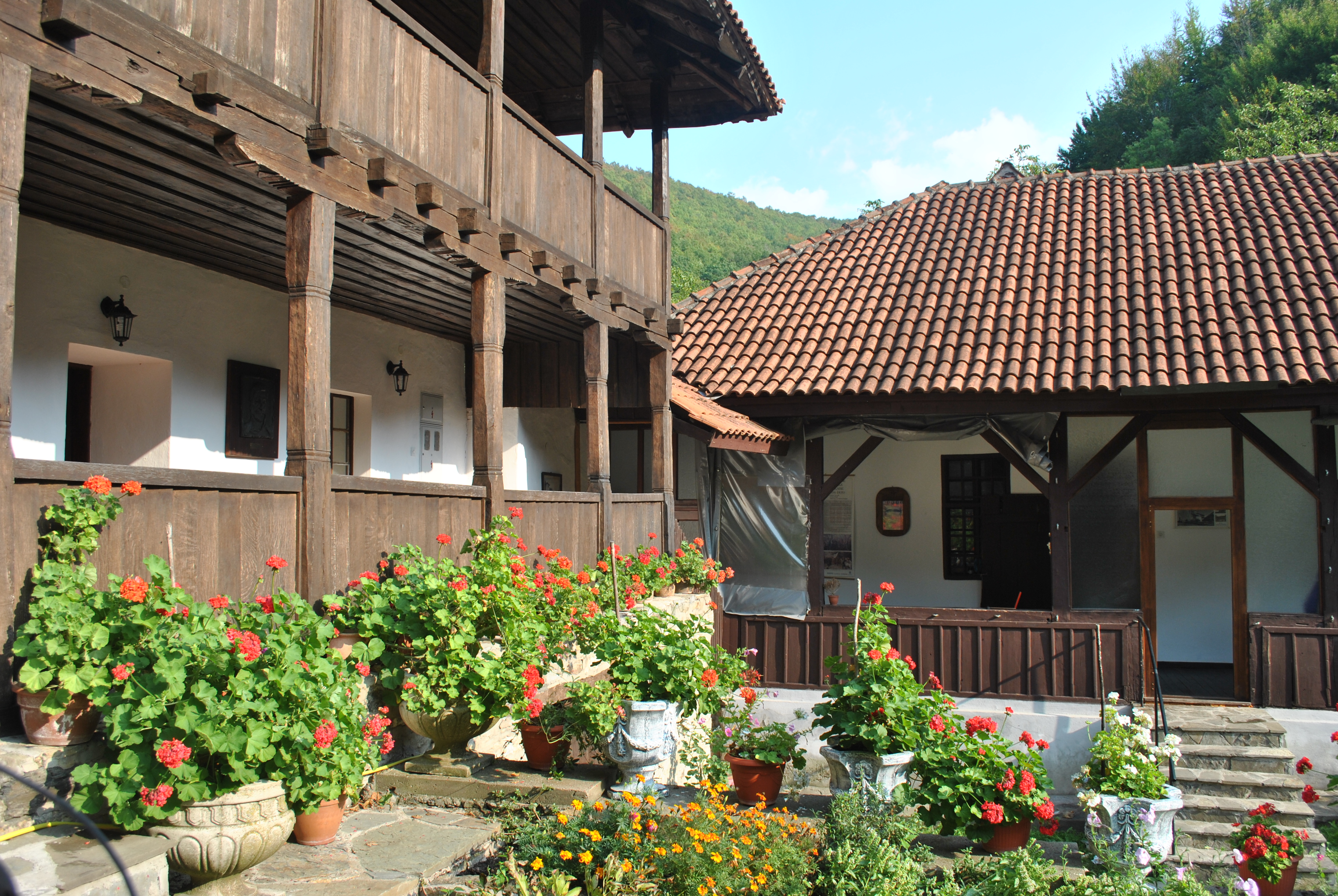 sediste prve srpske vlade, PRAVITELJSTVUJUSCEG SOVJETA